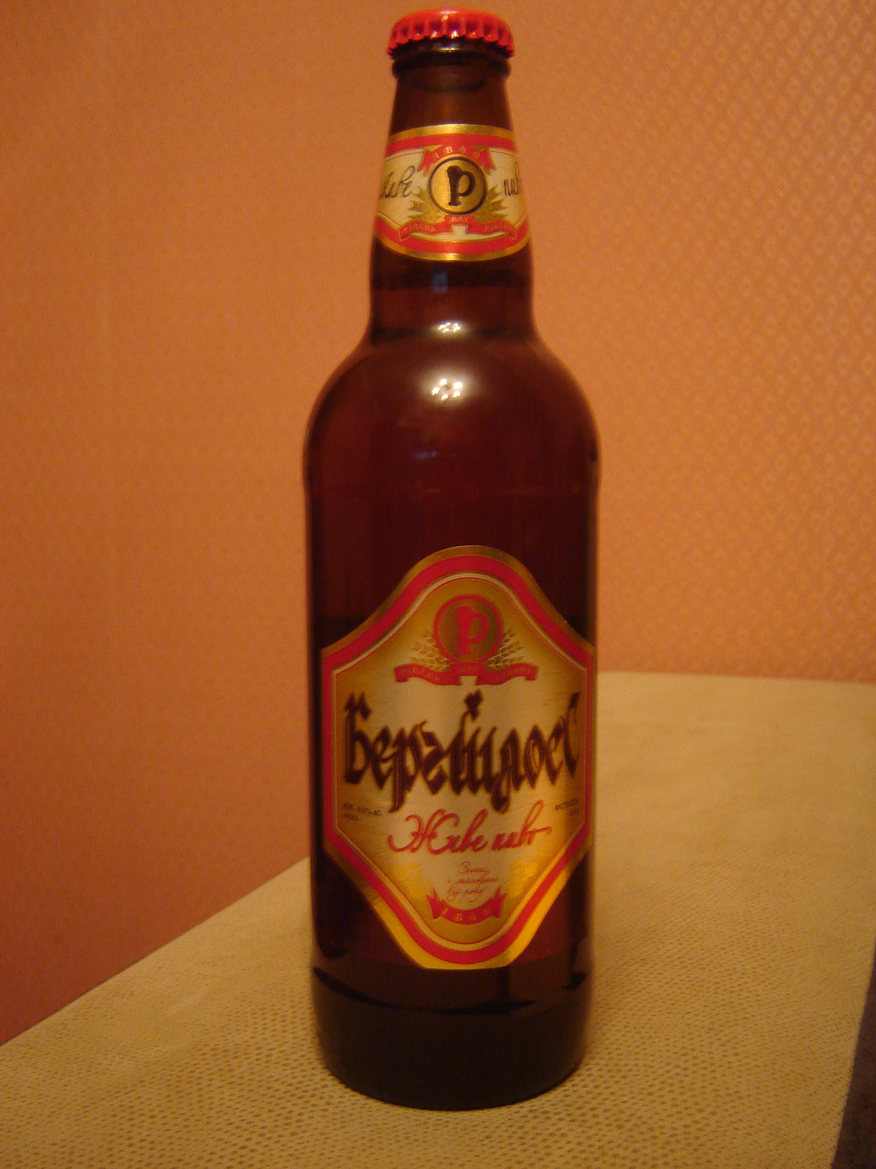 Пляшка пива "Бергшлосс": Пляшка пива "Бергшлосс" виробництва ВАТ "Рівень" (м.Рівне)